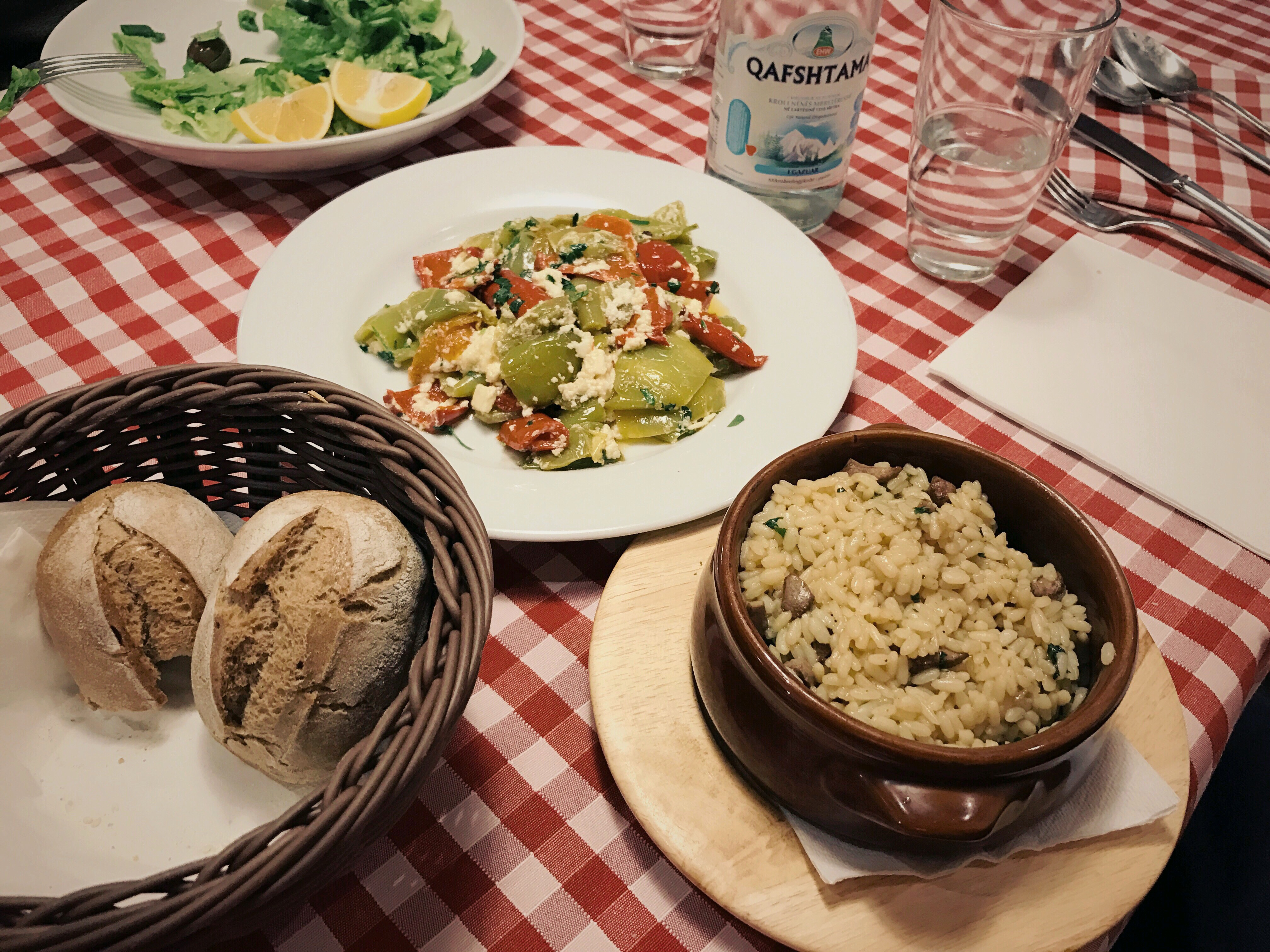 Fërgesë dhe Tavë me oriz